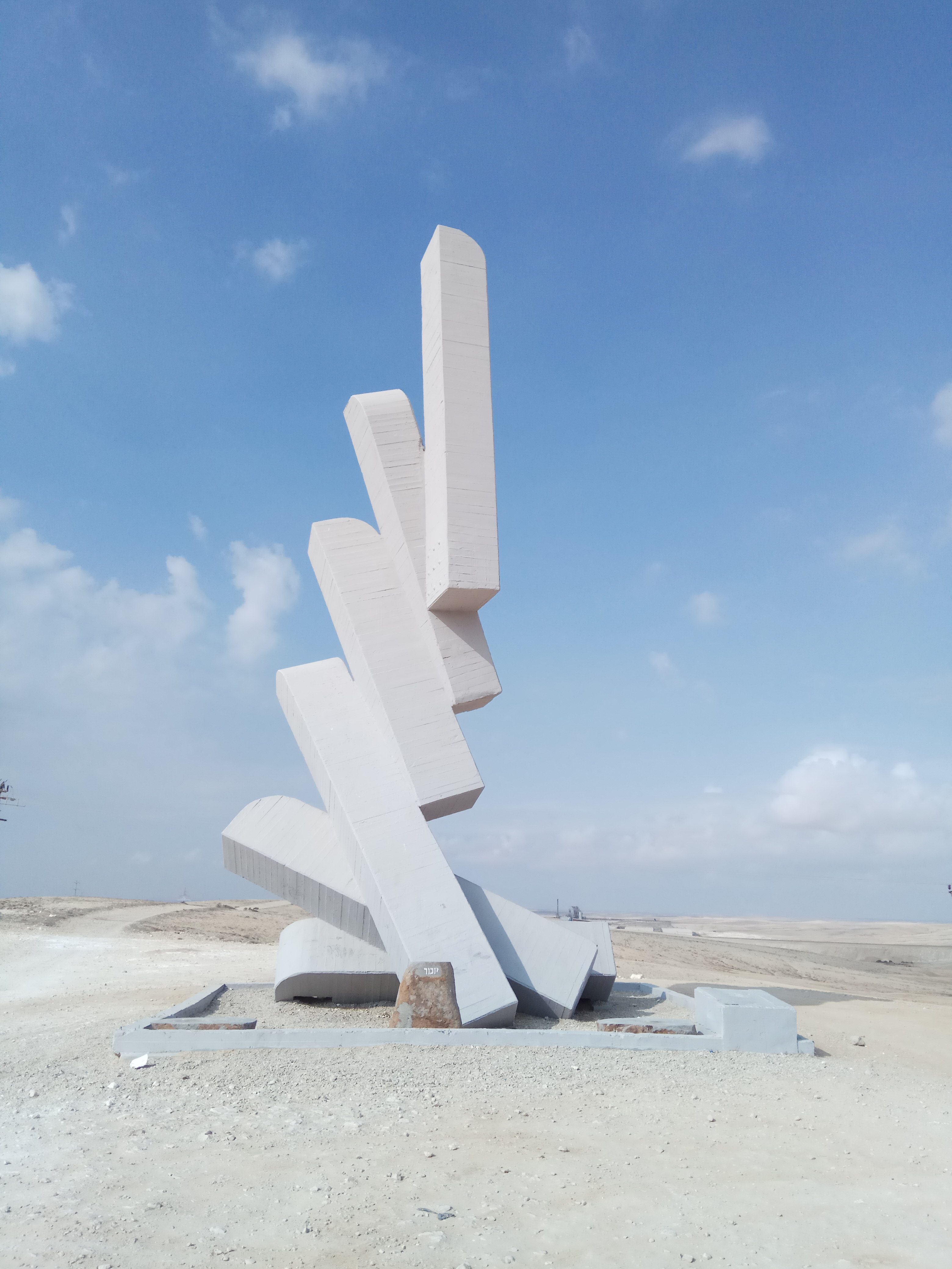 אנדרטת חטיבה 99 במלחמת ששת הימים מדרום לבאר שבע